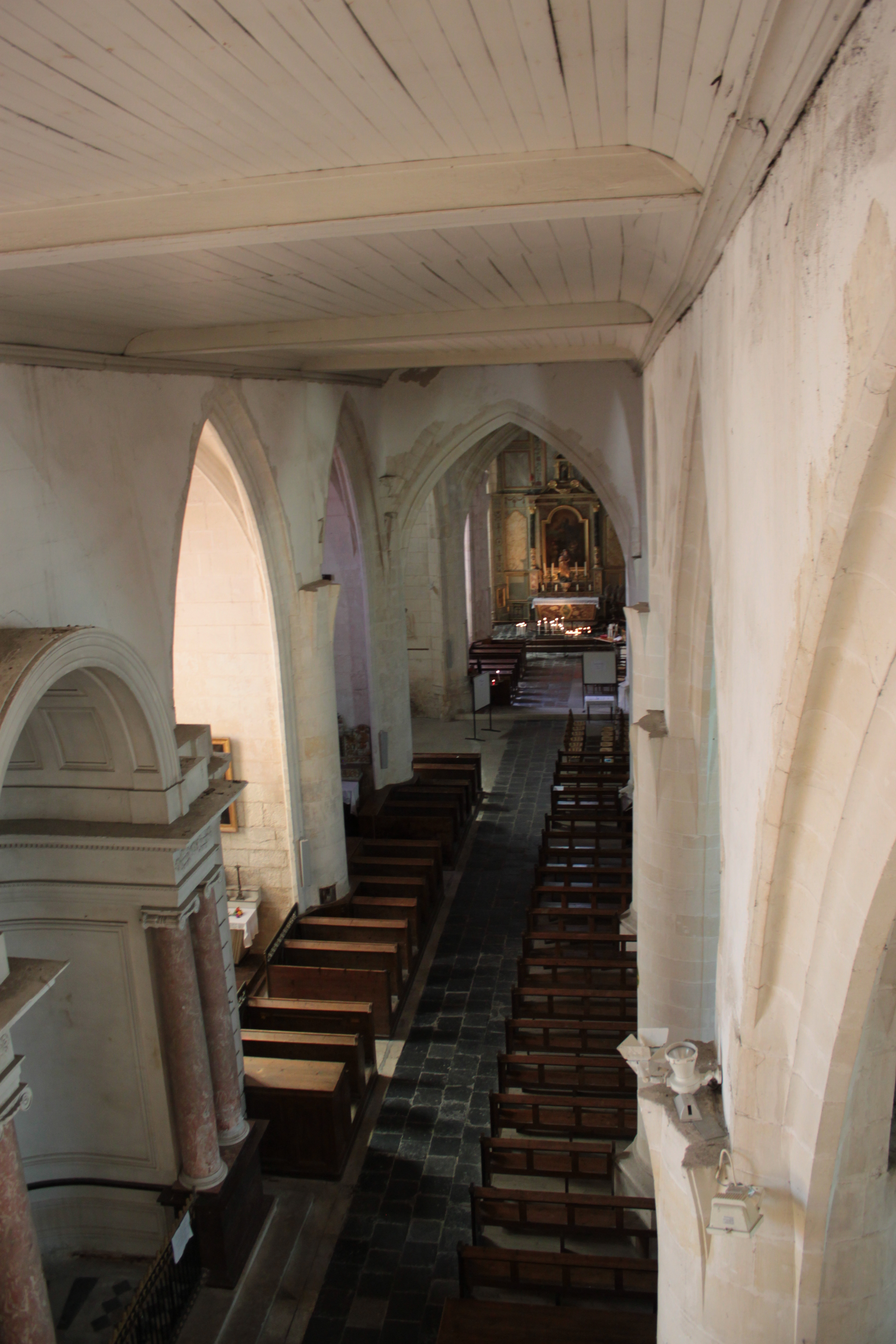 Nef, église Saint-Martin, Fr-17-Saint-Martin-de-Ré.